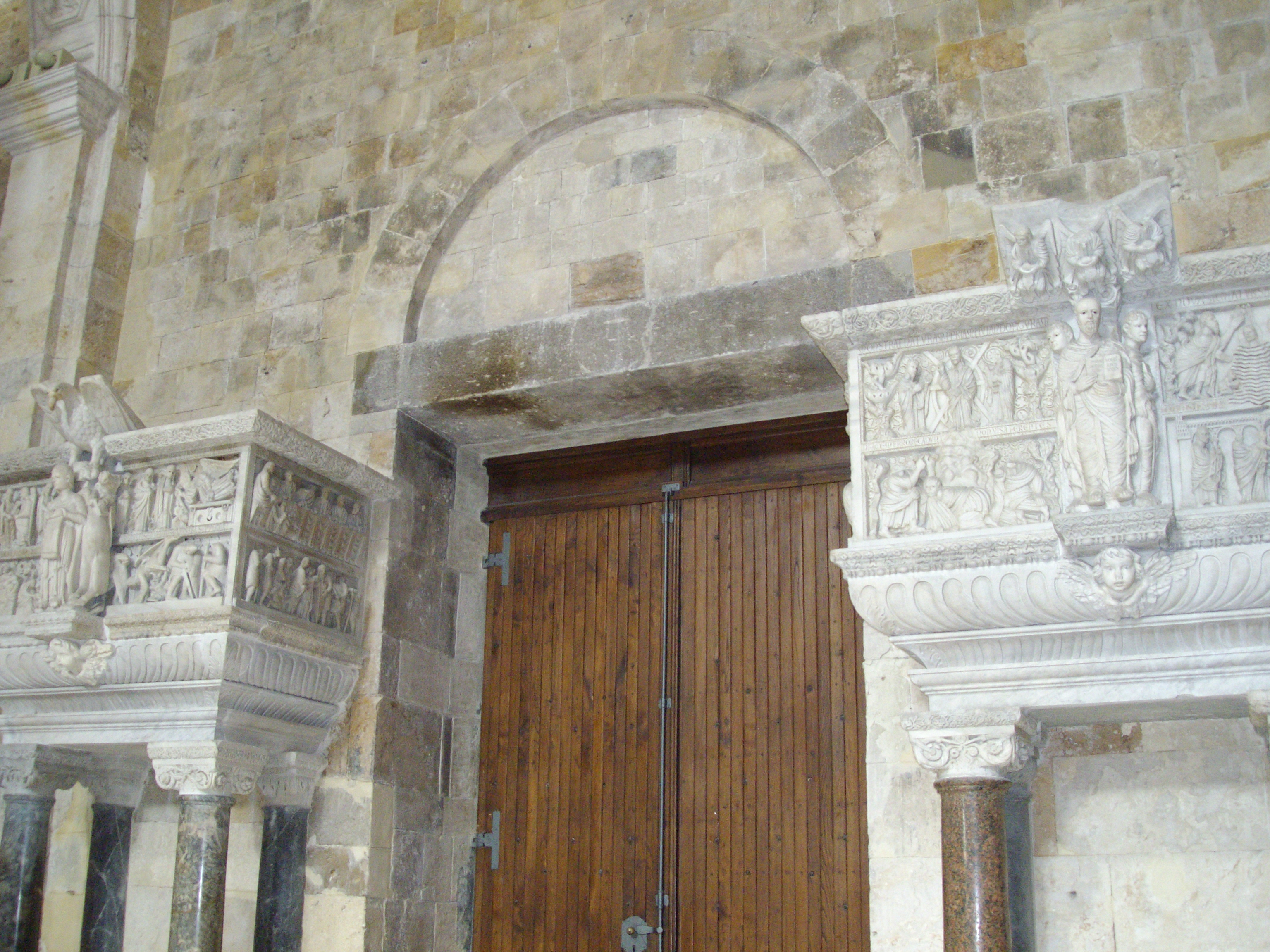 Cattedrale di Cagliari, pulpito di maestro Guglielmo (XII secolo)